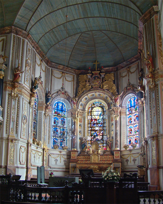 Église Notre-Dame, Saint-Thégonnec, Finistère, Bretagne, France. Le chœur.